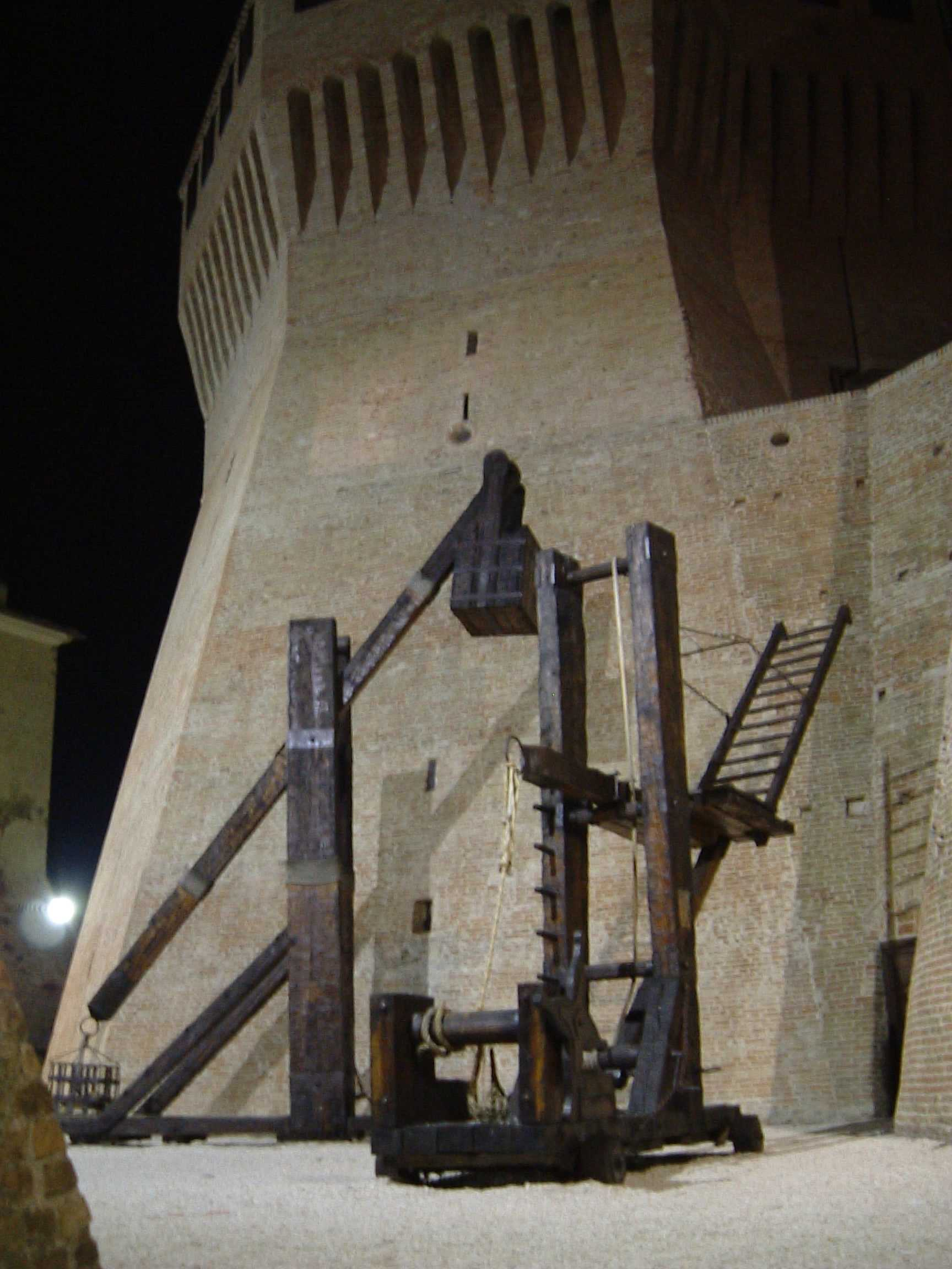 Macchine d'assedio di FdGM nel Fossato della Rocca di Mondavio